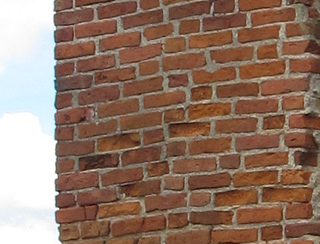 Беларуская (тарашкевіца): Крэўскі замак, 2014 год.